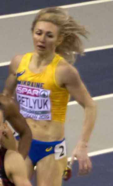 EKI10139 800m series eykens